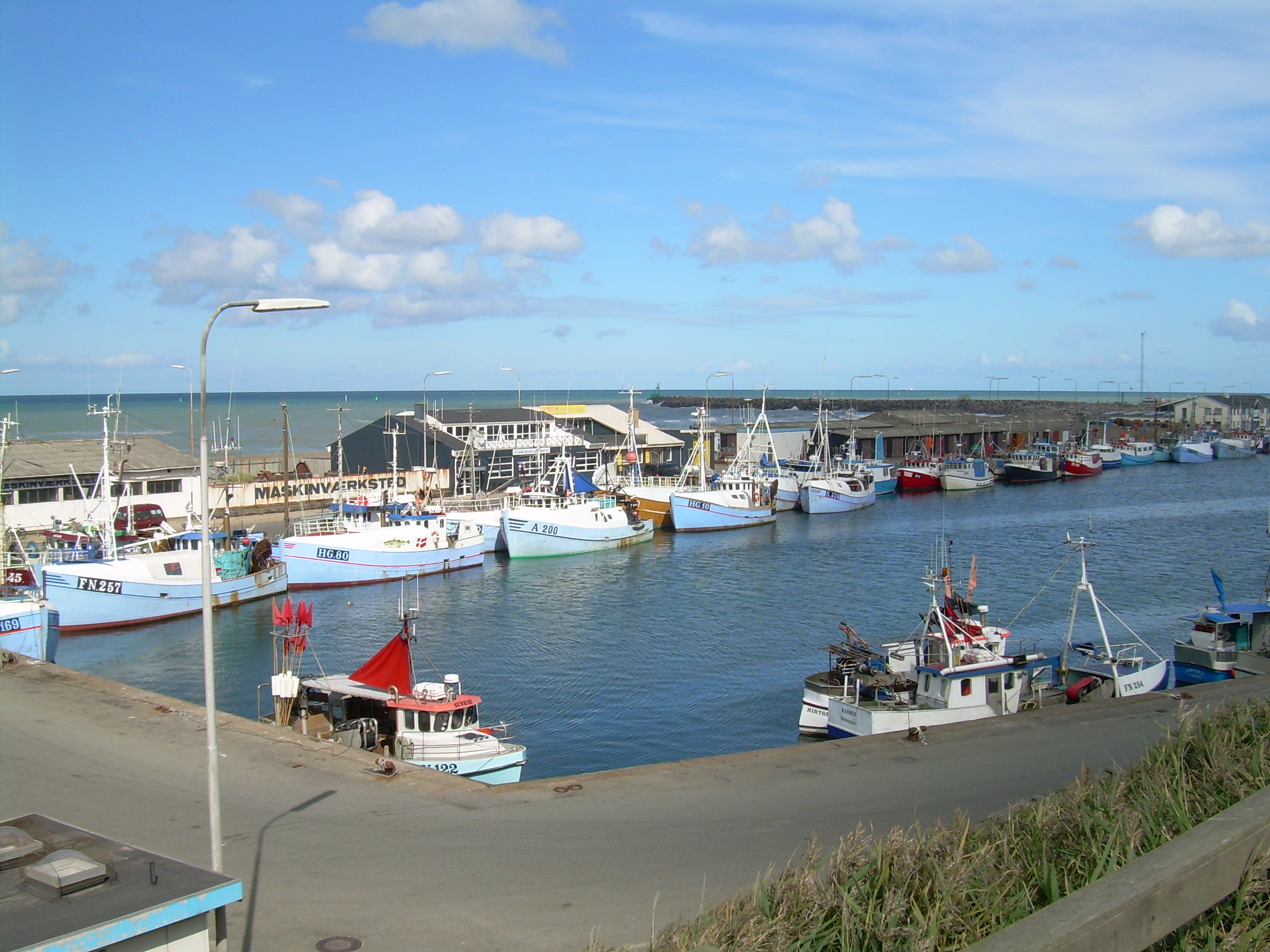 Hirtshals Harbour, Denmark